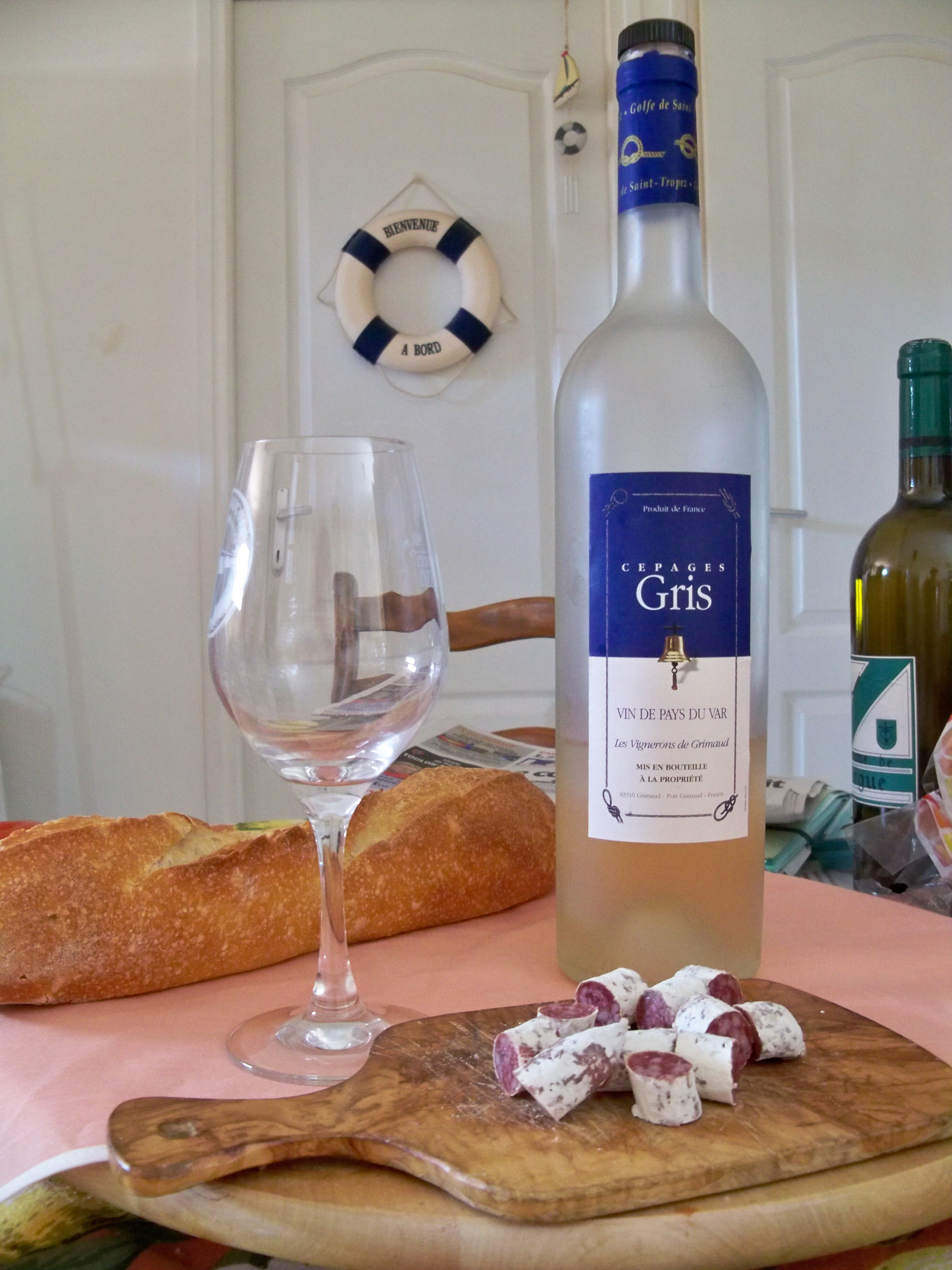 Vin de Pays du Var - bouteille de Cépages Gris